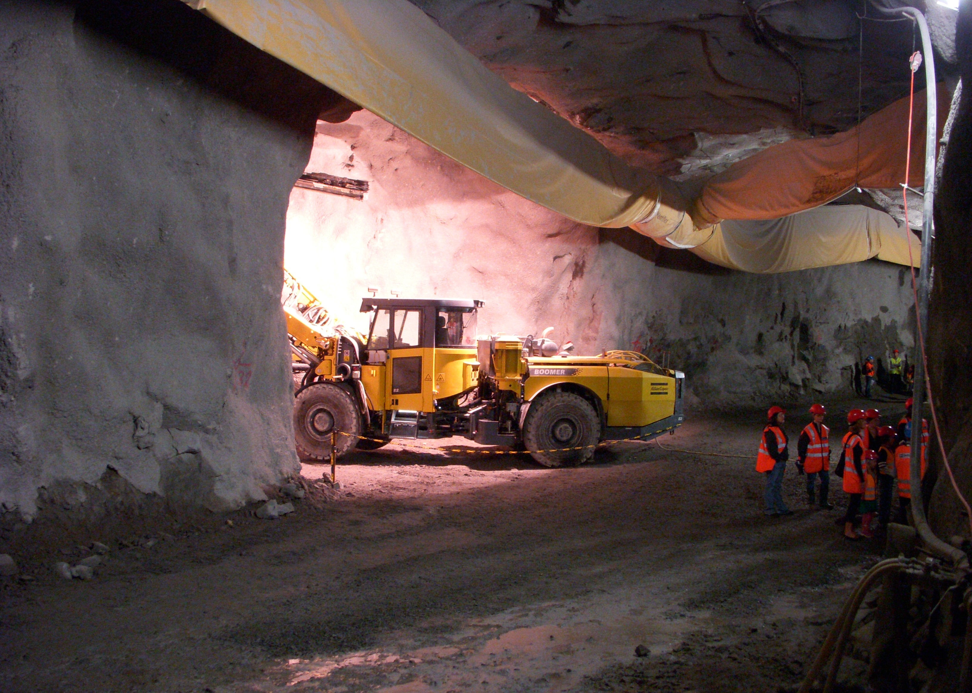 Citybanan, arbeten med servicetunneln, visning den 2009-09-20